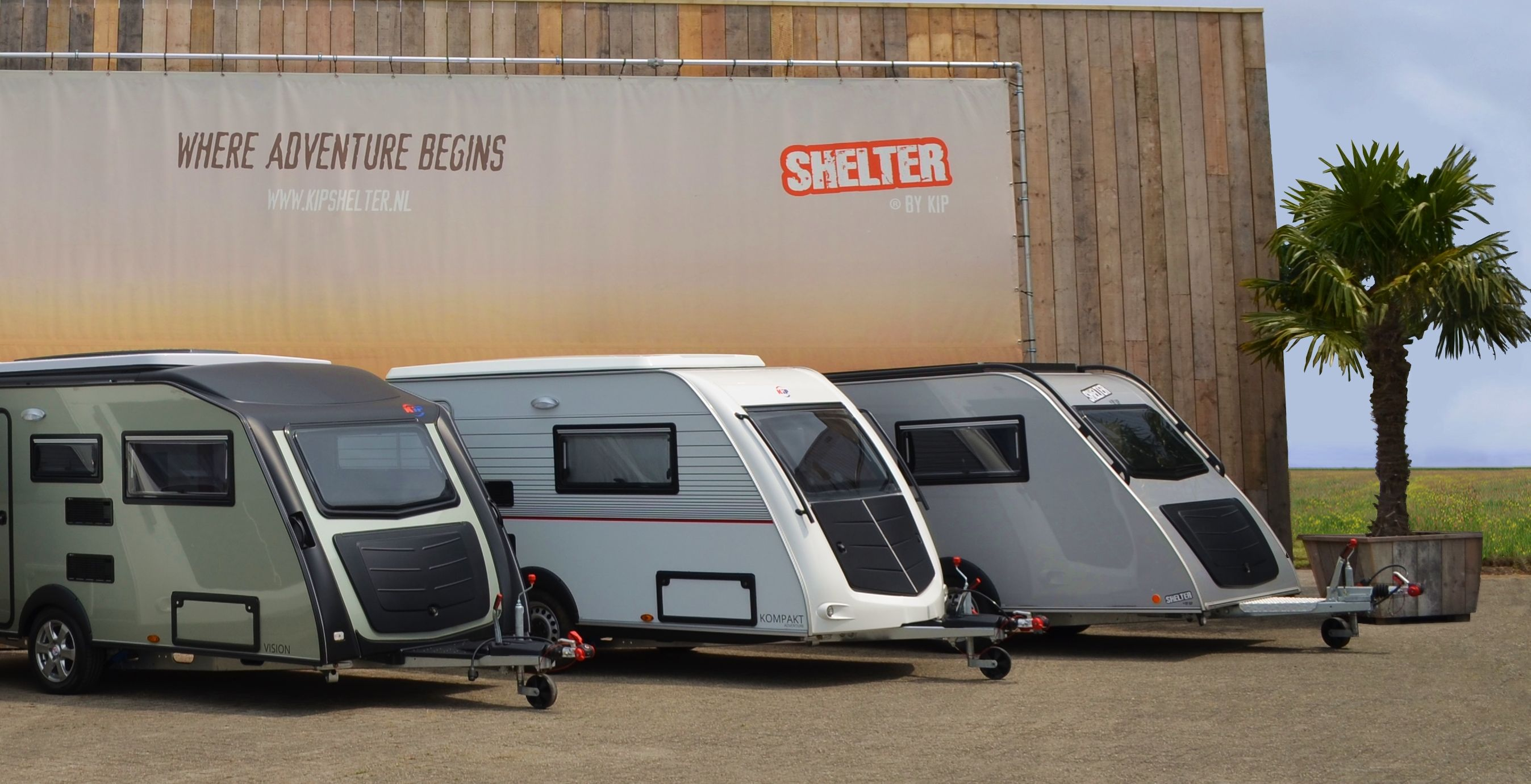 De nieuwste Kip modellen. Shelter, Kompakt en Kip Vision